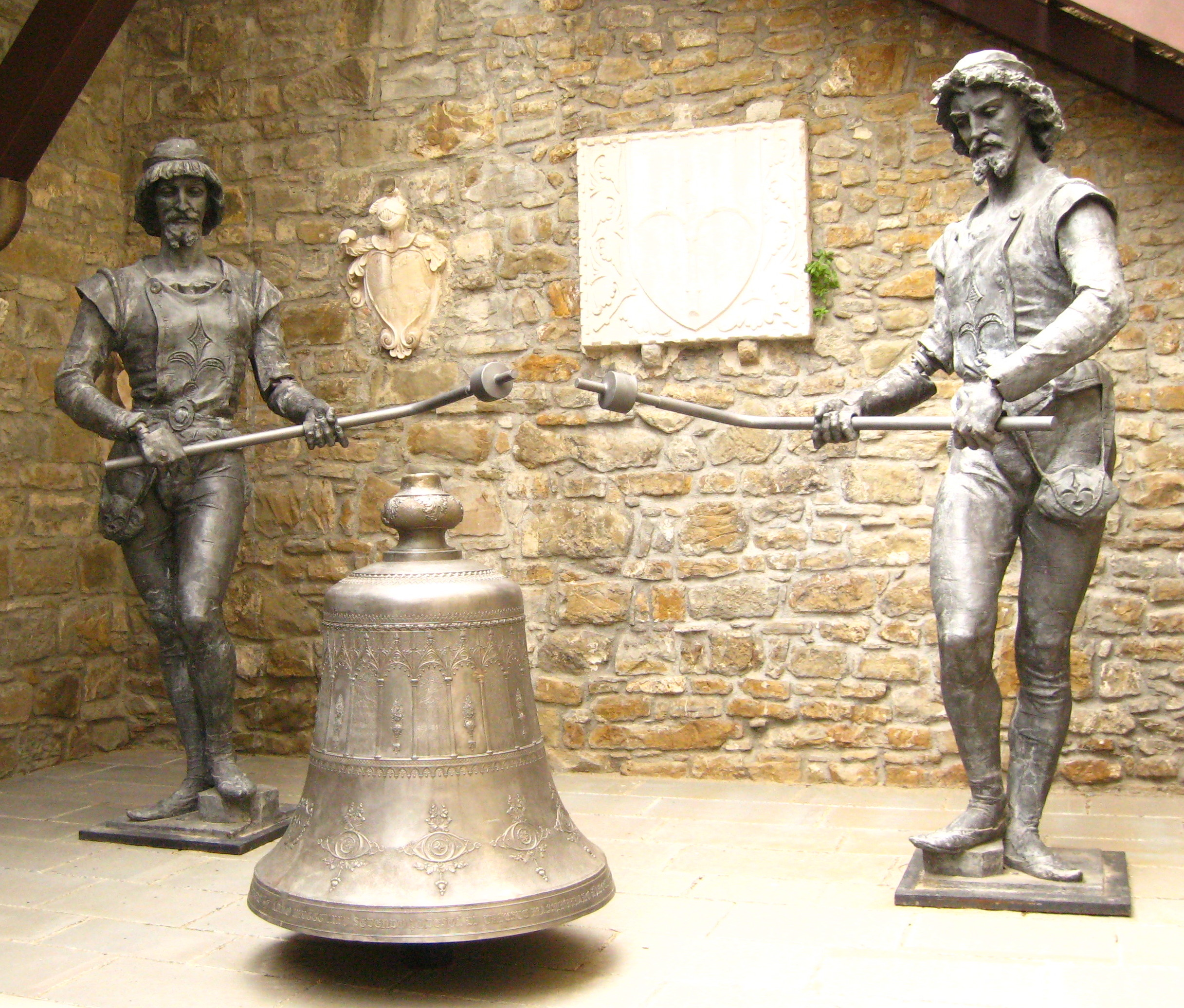 Gli automi originali della torre campanaria del comune di Trieste, ora esposti al castello di San Giusto. Giugno 2008